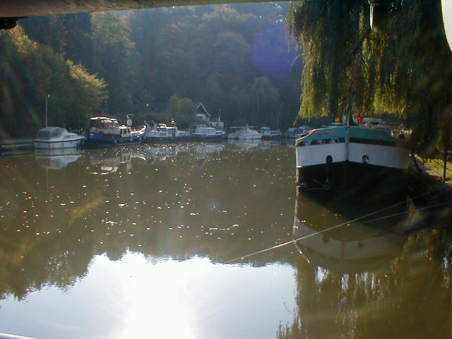 Walon: Li poirt di plaijhance di Landliye (poirtrait saetchî pa L. Mahin)